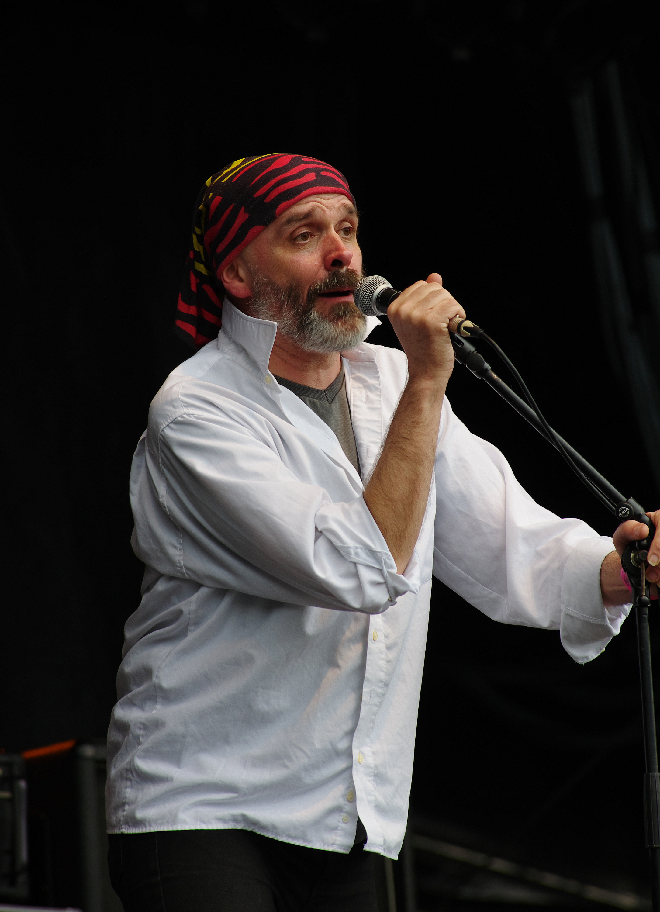 Kein Hass da, Punk-Band um Karl Nagel, Auftritt beim Ruhrpott Rodeo 2013 in Hünxe. Karl Nagel (voc)